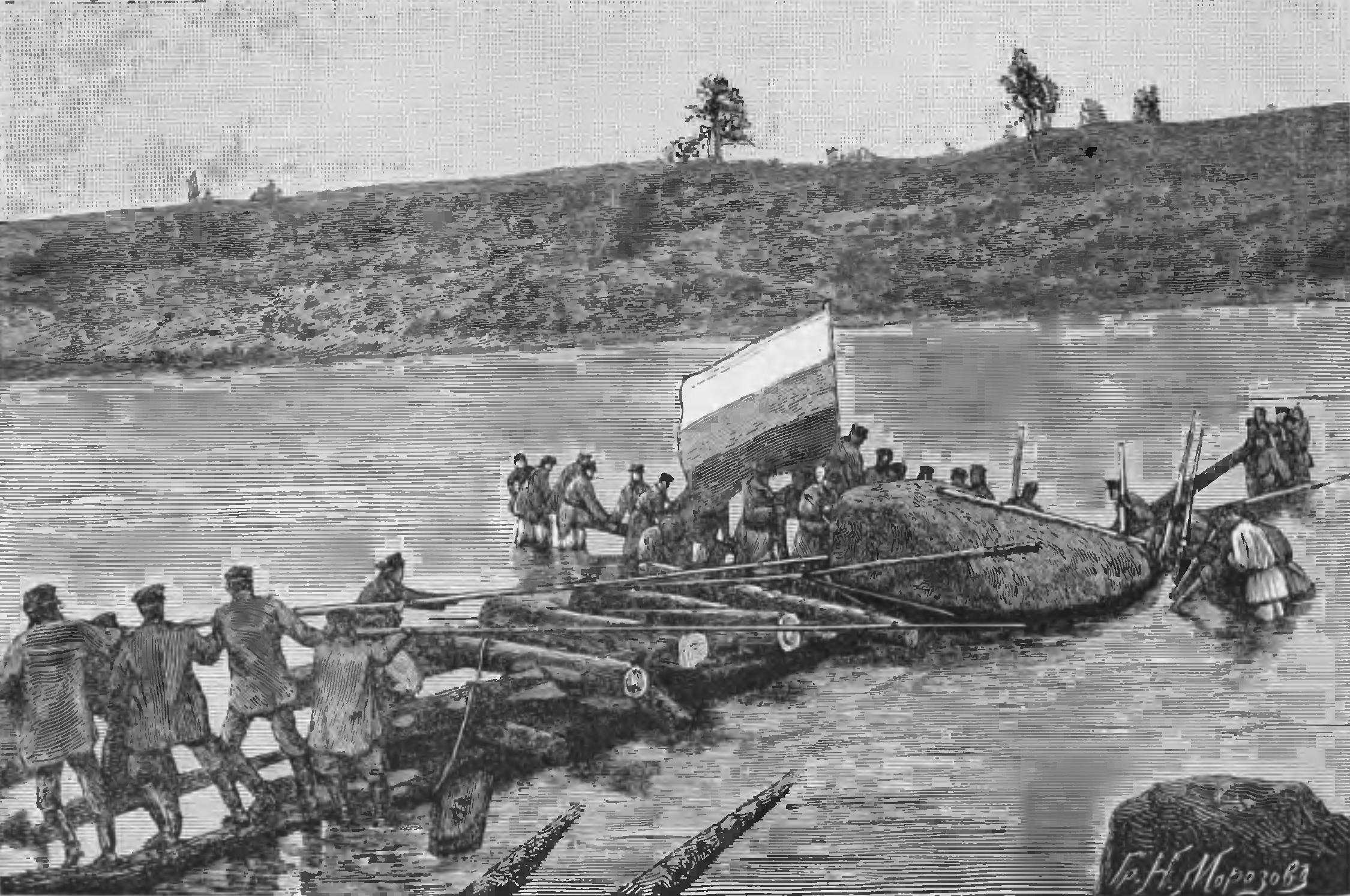 Иллюстрация книги «Белорусские древности» стр.95 илл.58